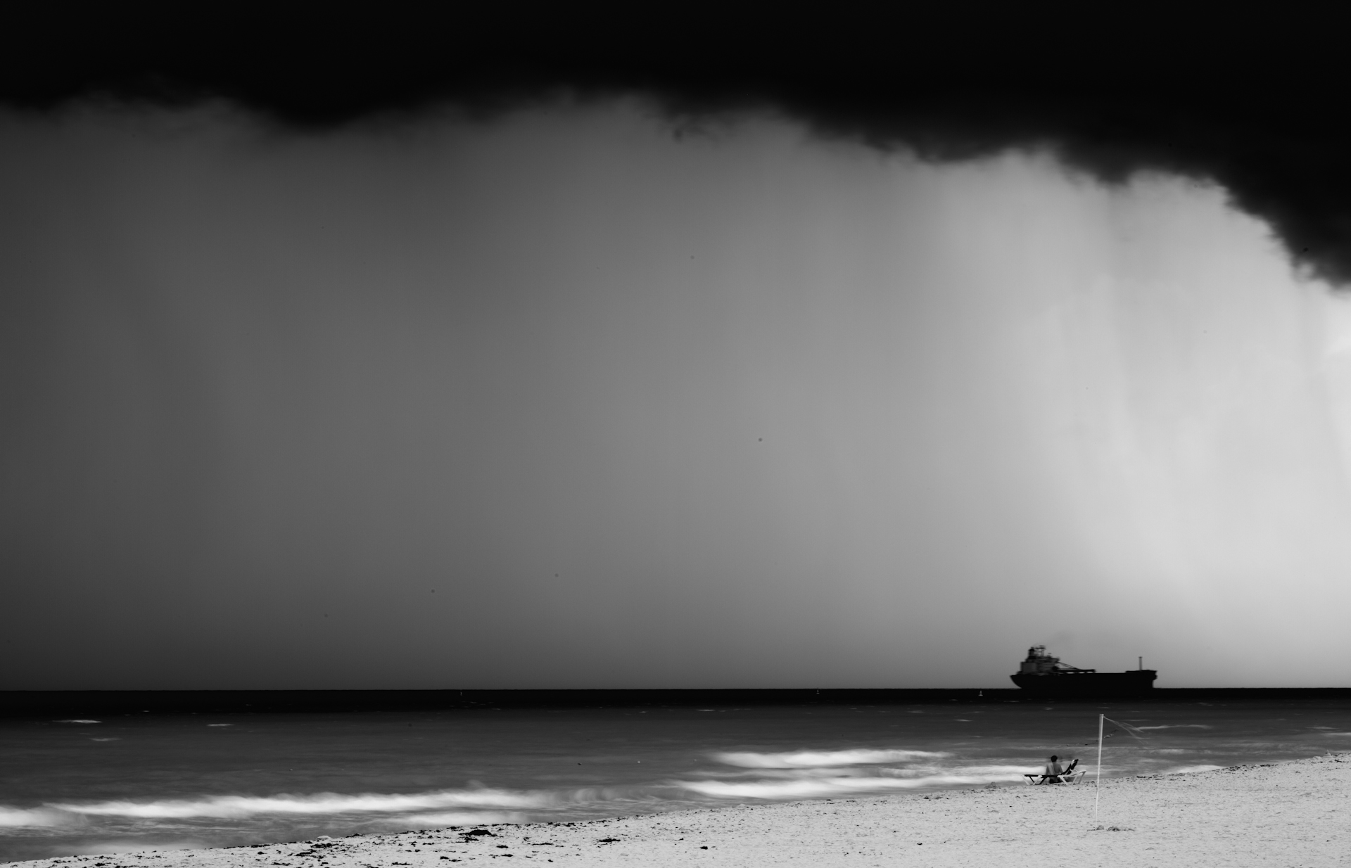 Tormenta tropical Arlene. Península Yucatan, Estado de Quintana Roo, Mexico. Camera: Canon EOS 5D Mark II Lens: Zeiss Makro-Planar T* 2/100 ZE 3 sec at f/22 ISO: 50